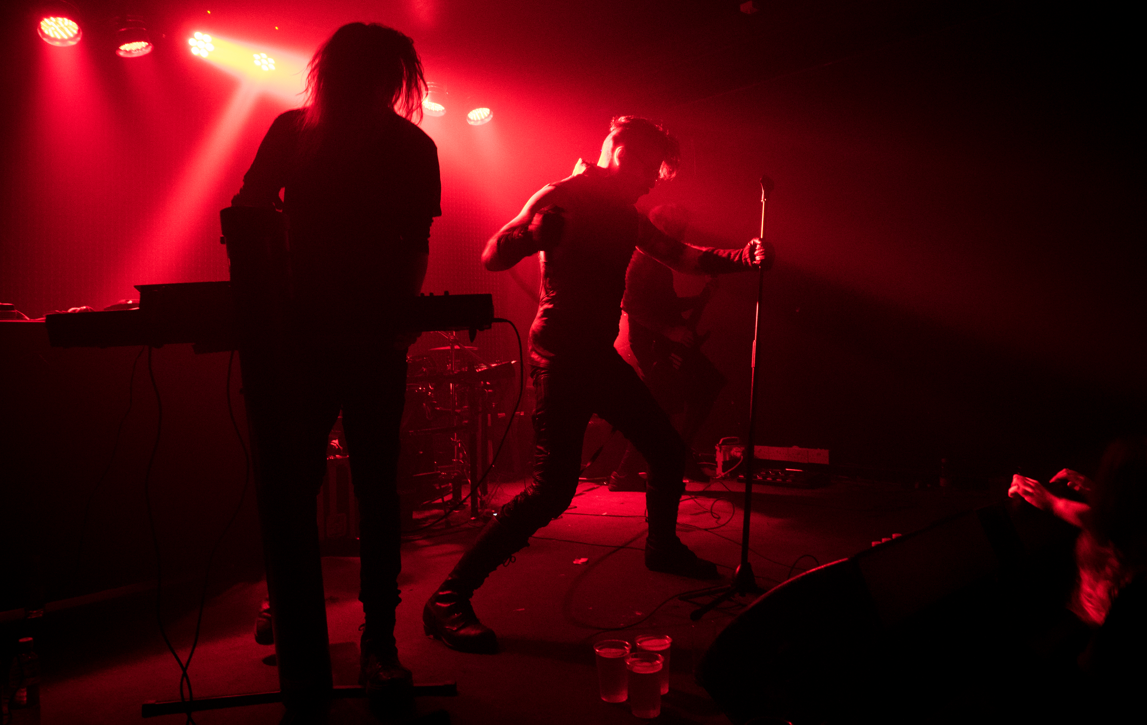 Voodoo Lounge Dublin 2015